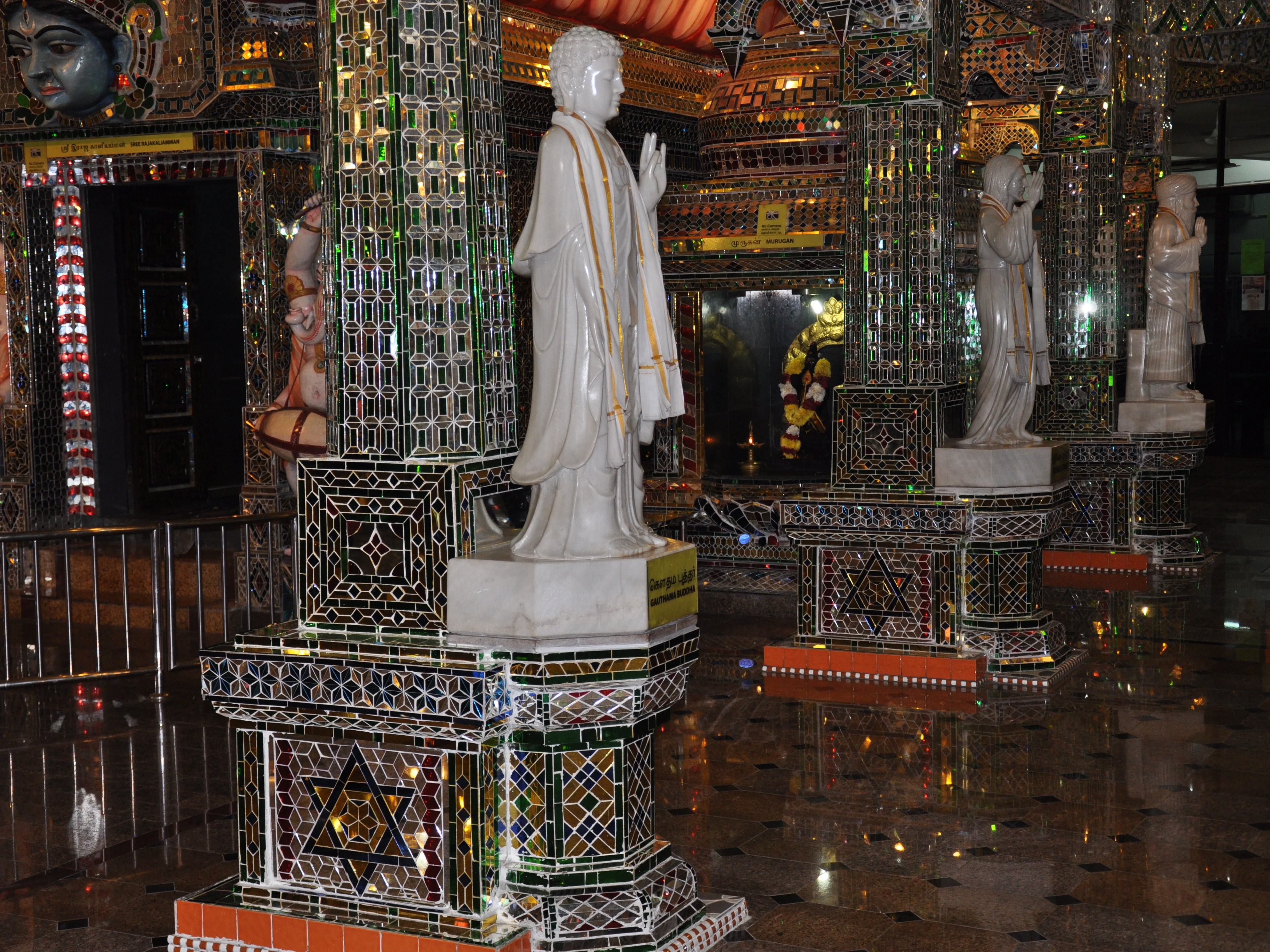 Arulmigu Sri Rajakaliamman